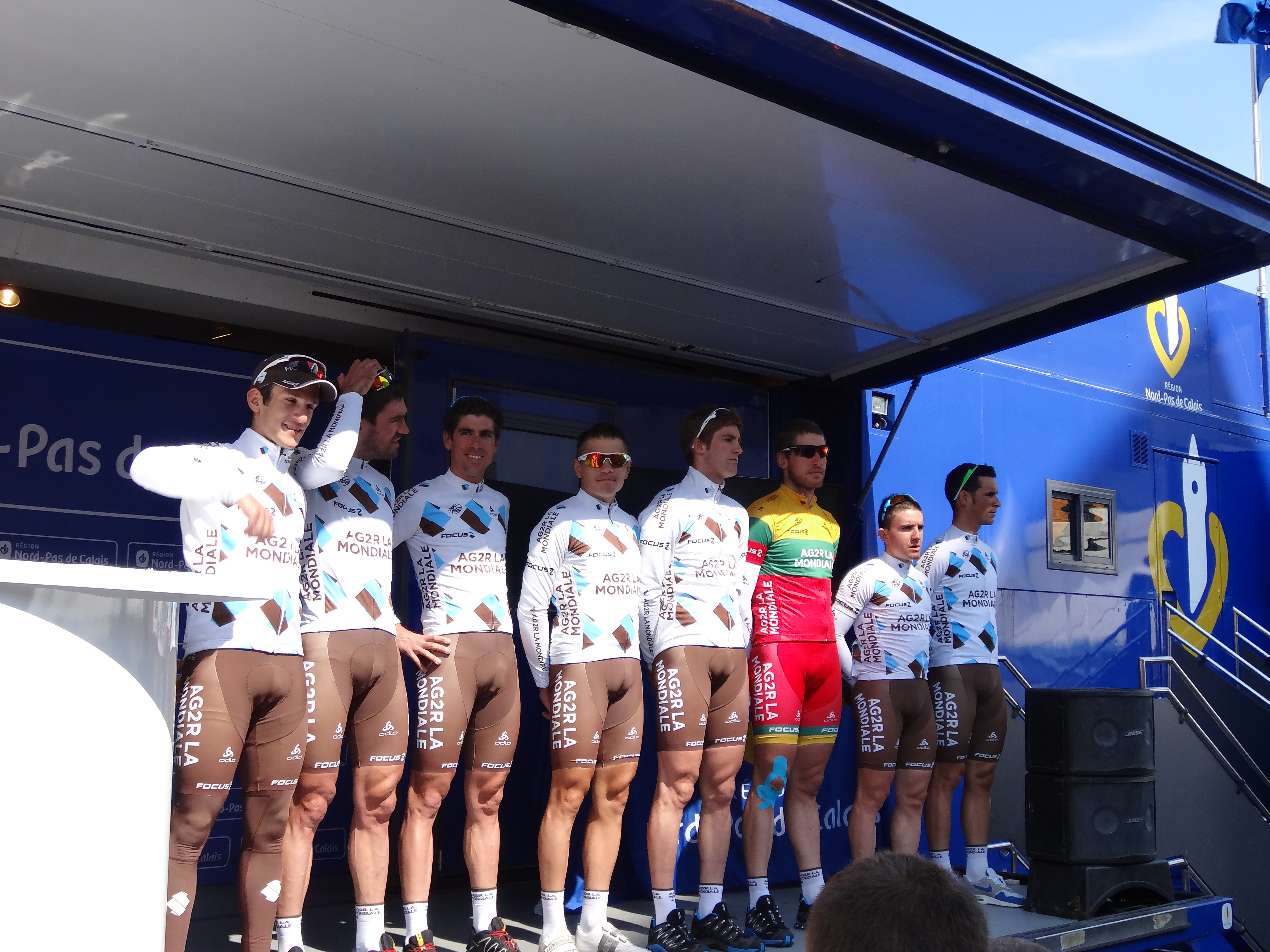 Reportage photographique réalisé le mercredi 1er mai 2013 au départ de la première étape de l'édition 2013 des Quatre jours de Dunkerque à Dunkerque, Nord, Nord-Pas-de-Calais, France. Le dossier photographique montre des véhicules de course exposés, la caravane publicitaire, la présentation des coureurs, et le départ. Depicted people: Blel Kadri, Christophe Riblon, Sébastien Minard, Valentin Iglinskiy, Hugo Houle, Gediminas Bagdonas, Samuel Dumoulin and Lloyd Mondory